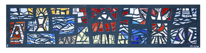 Betonfenster Leichenhalle Ramsfeld-Pleinfeld Alfons Abel (1908–1994) DescriptionGerman stained-glass artist, painter and aquarellistDate of birth/death 19 January 1908 28 June 1994Location of birth/death Nuremberg NurembergWork location Nuremberg (1925), Munich (1928-1929), Berlin (1929-1931), Nuremberg (1931-....), Sofia (1934), Crete (1942-1946), Egypt, Cairo, Nuremberg (1947-1994), GreeceAuthority control : Q1636988 VIAF: 695148814287645330004 GND: 1126121169 creator QS:P170,Q1636988